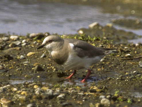 Magellanic Plover - Tierra del Fuego - Argentina 96 0027